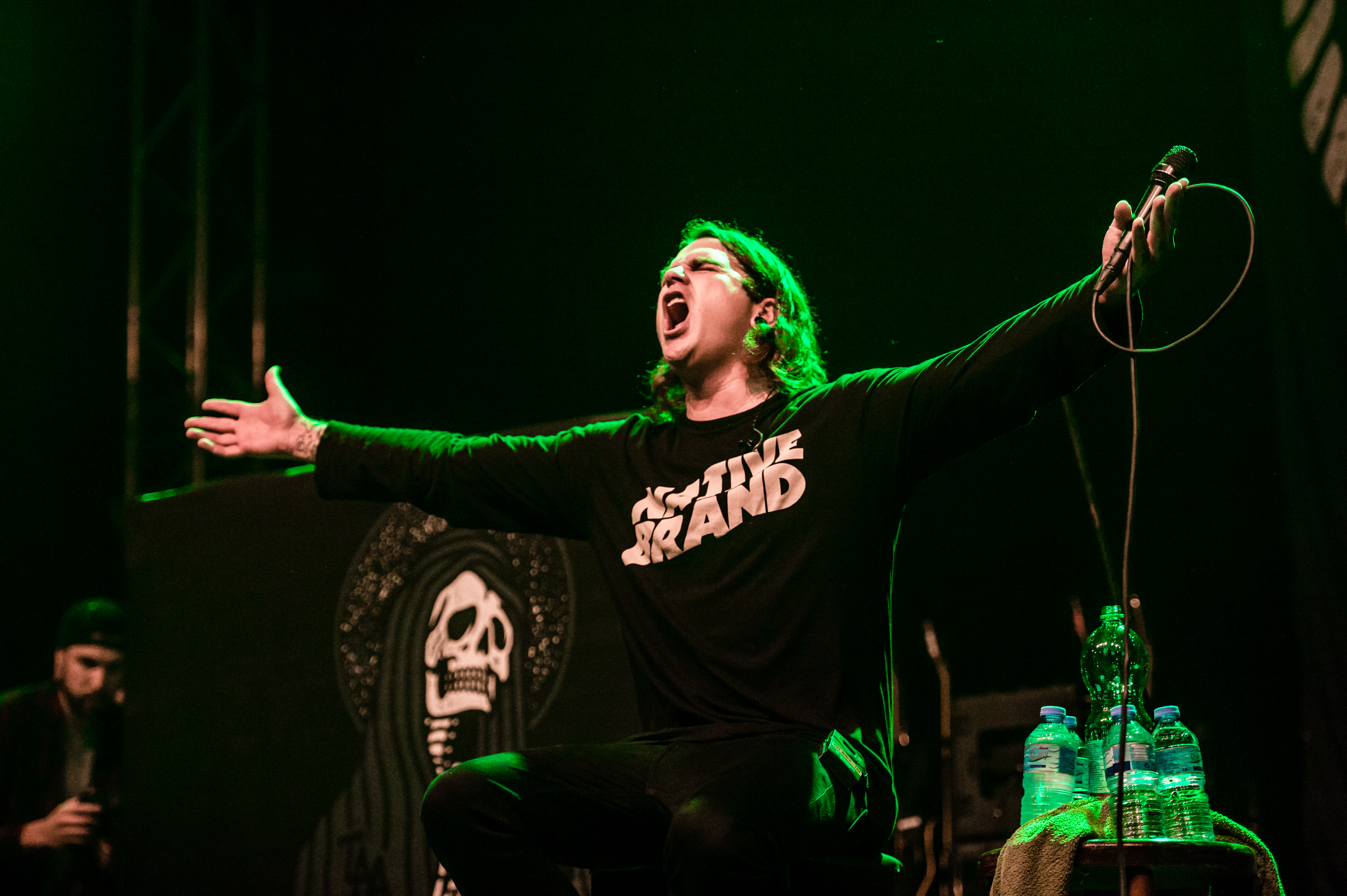 'The Amity Affliction - Impericon Never Say DIE! - Oberhausen'